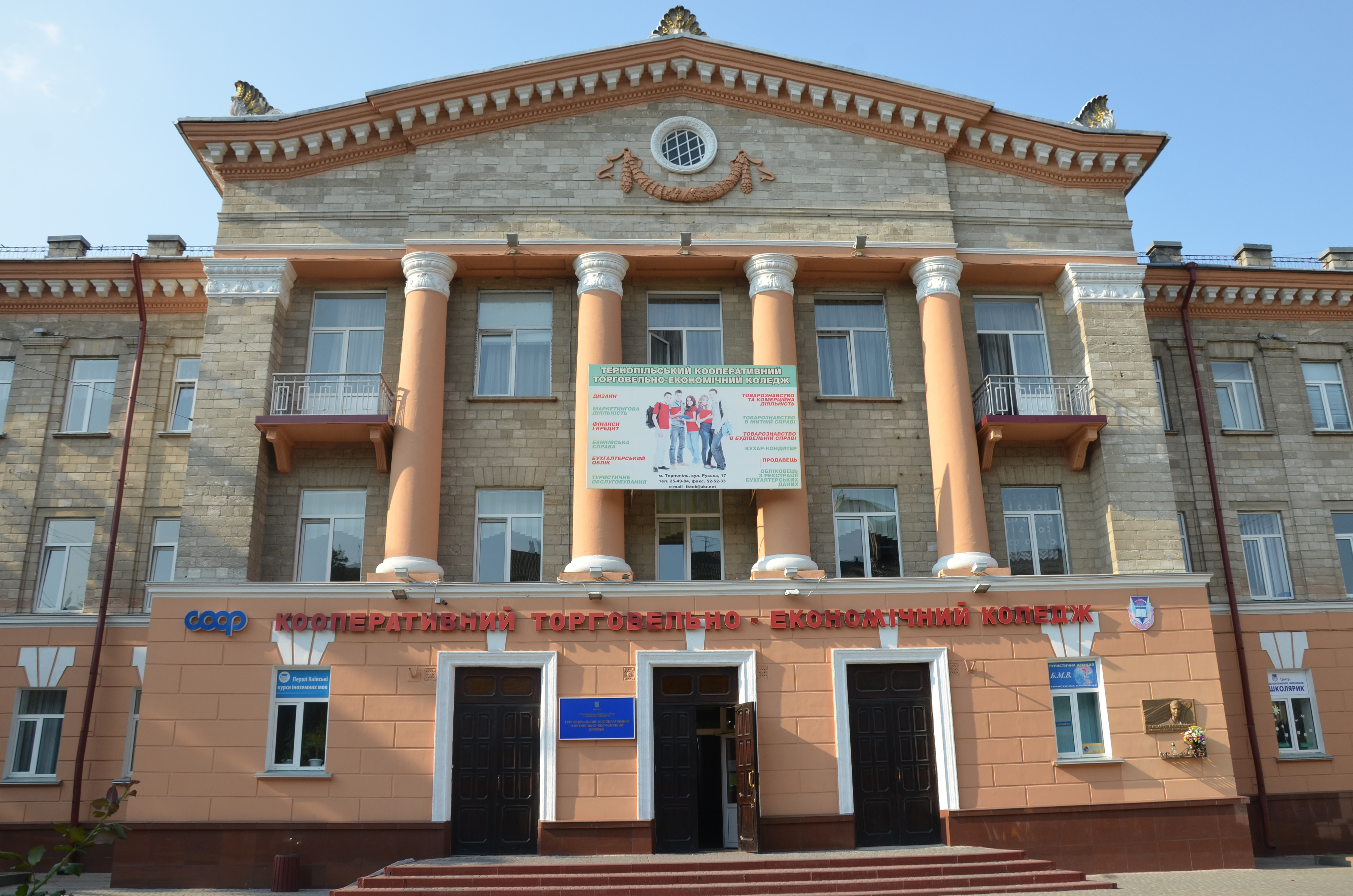 Будинок по вулиці Руській, 17. Тернопіль.